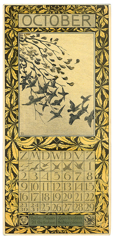 Kalenderblad oktober 1904. ‘Vallende bladeren en vlucht vogels’, uitgeverij: Tresling & Co.